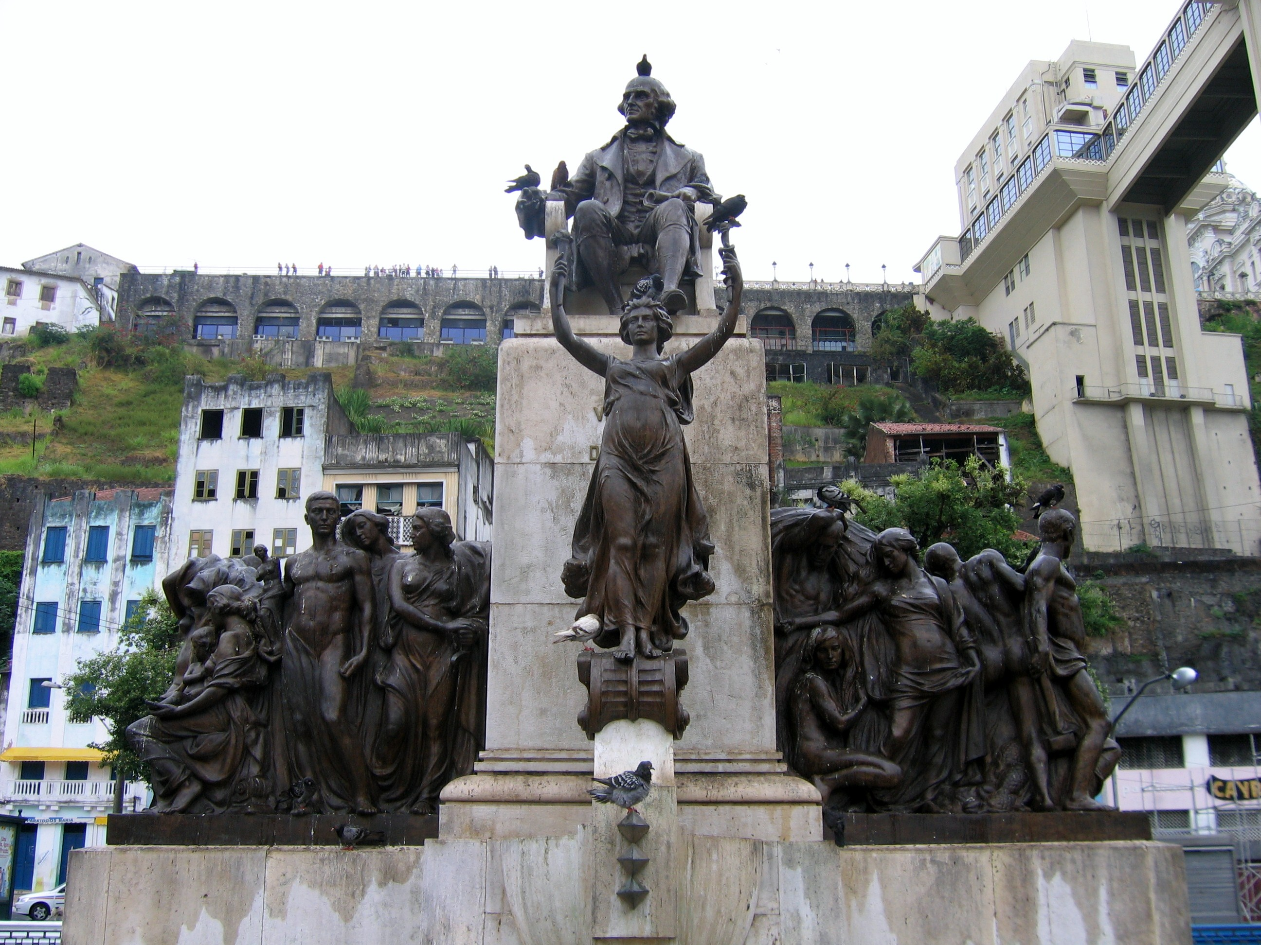 Au pied de l' Ascenseur Lacerda à Salvador (Bahia), Brésil.